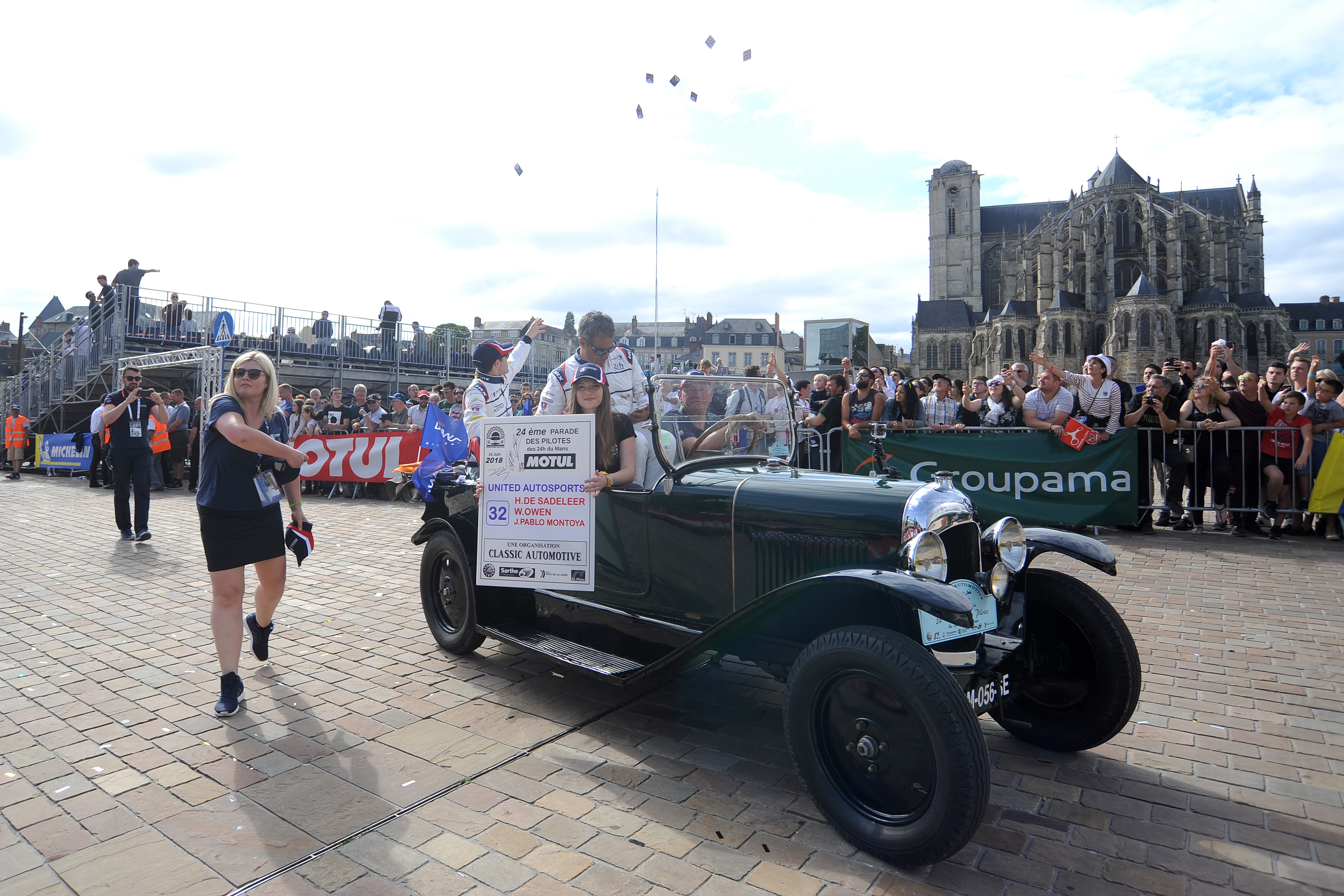 United Autosport lors des 24 Heures du Mans 2018.